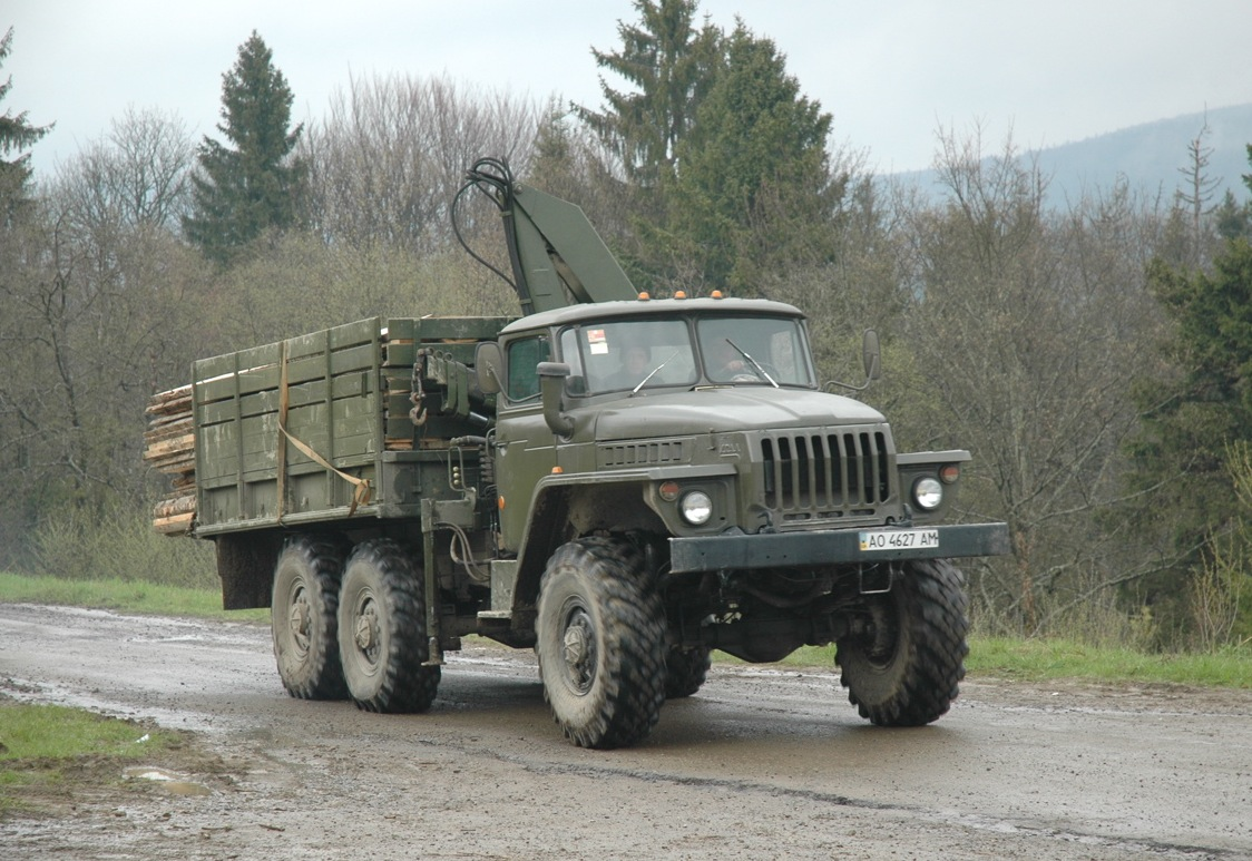 Ural-4320 6x6 truck in Zakarpattia, Ukraine